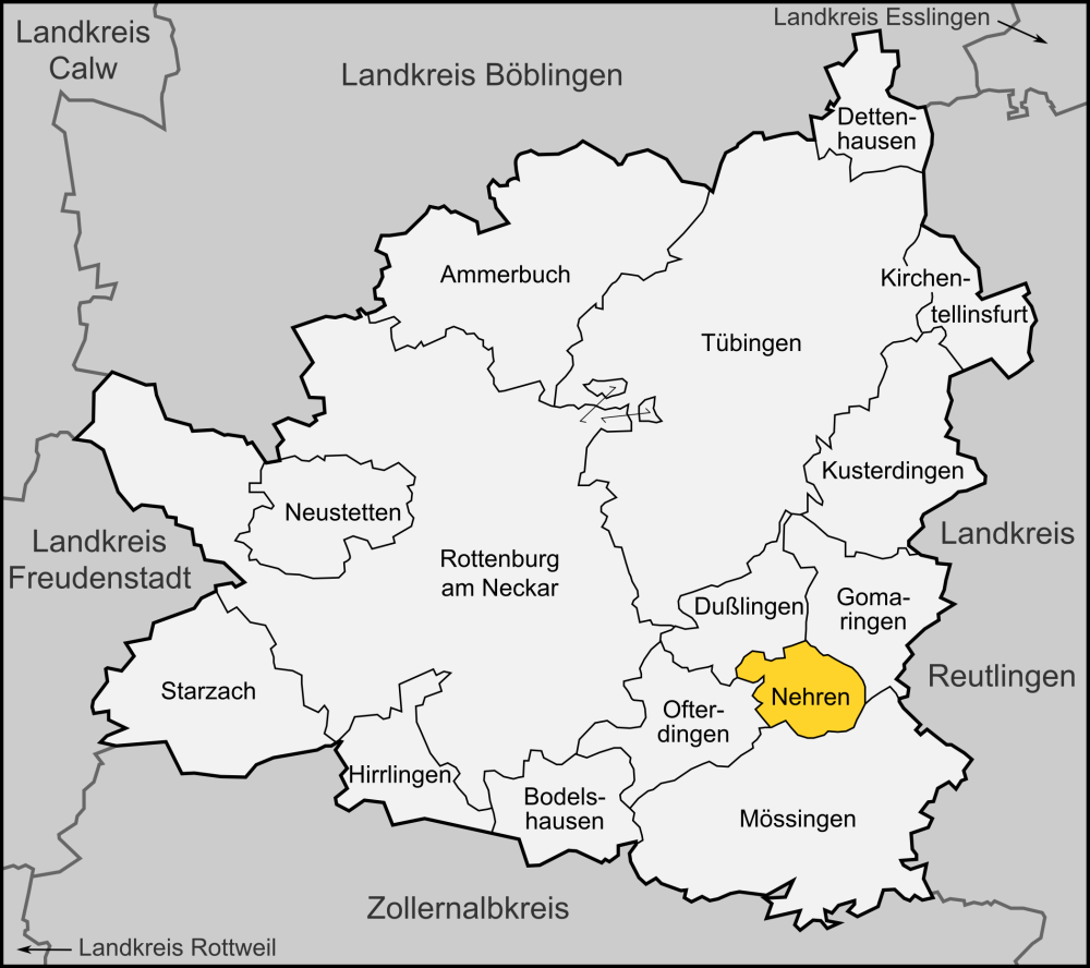 Karte der Gemeinde Nehren im Landkreis Tübingen